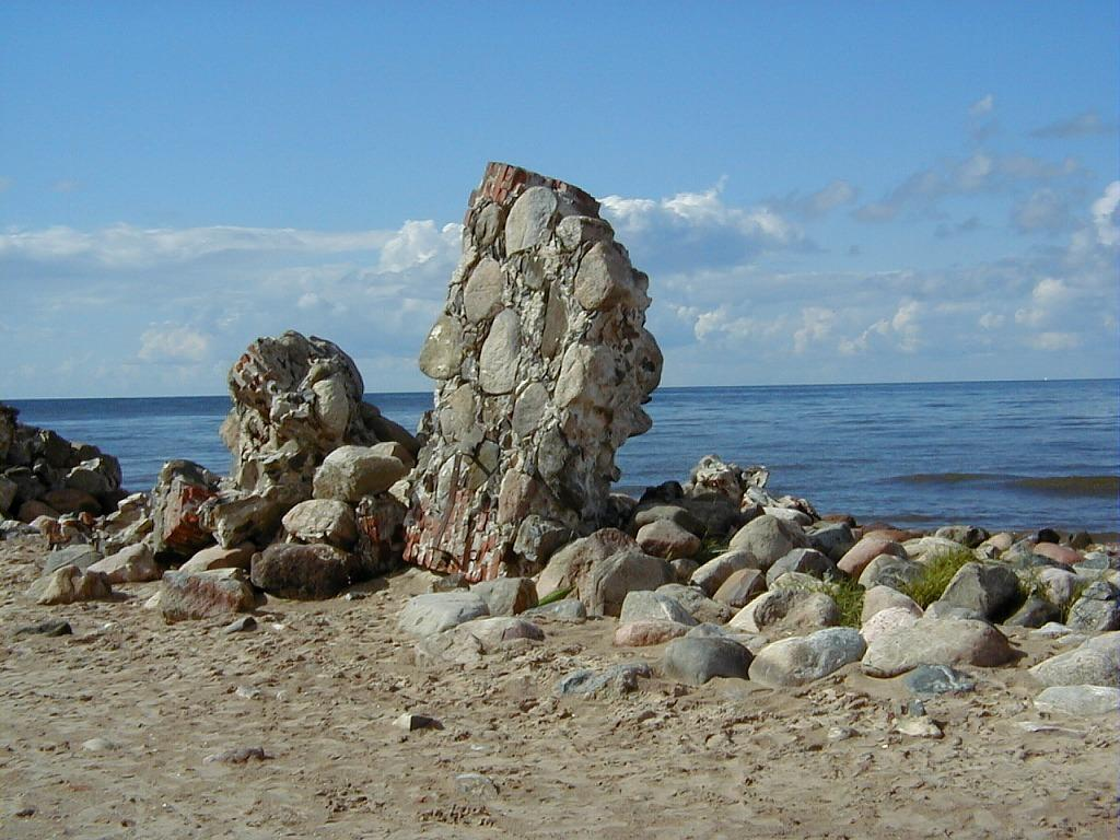 Kolkas raga piekraste. 1999-07-17